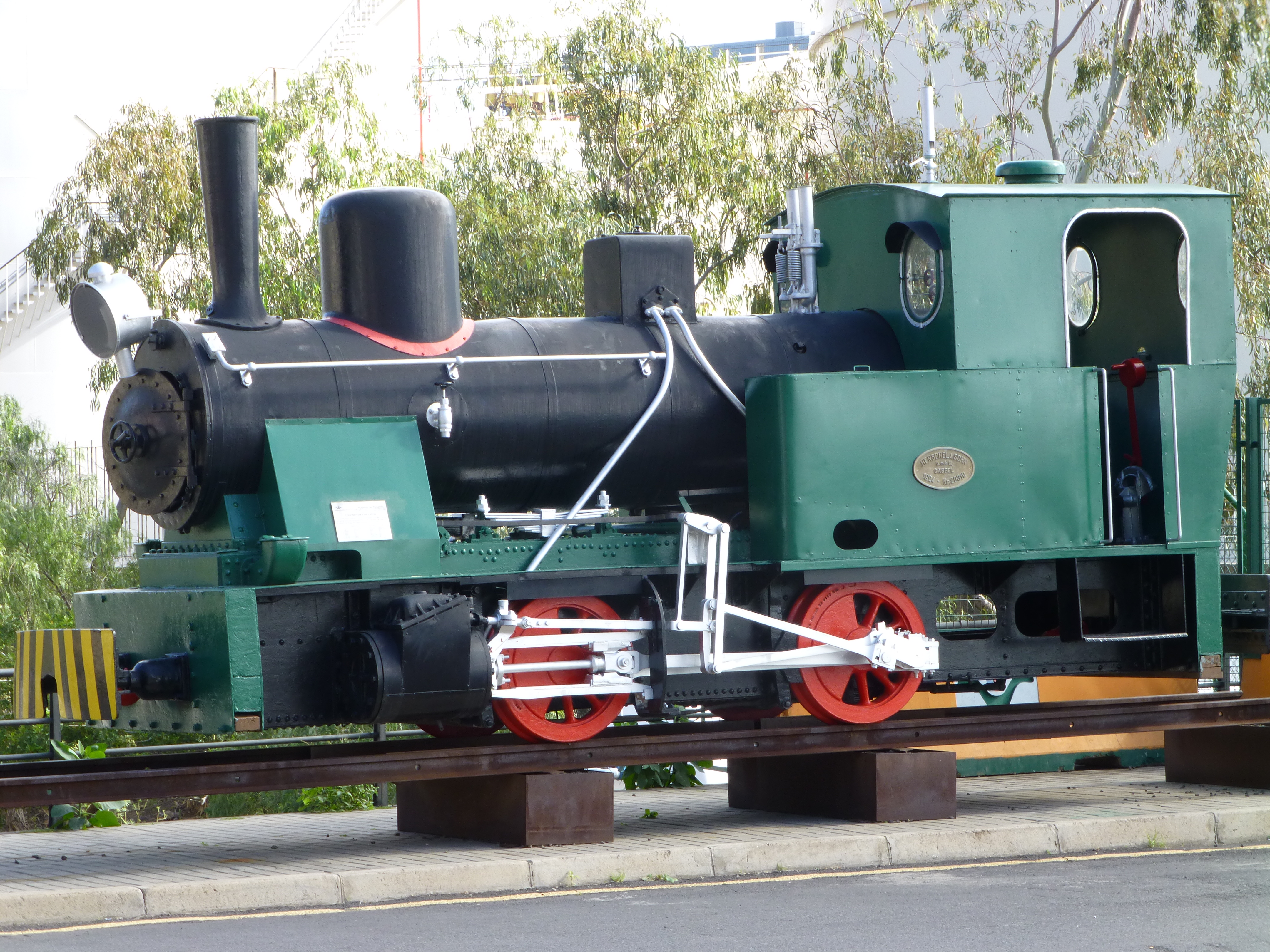 Locomotora de vapor conservada en Santa Cruz de Tenerife (Islas Canarias, España). Fabricada por Henschel und Sohn, en Kassel (Alemania), en el año 1924. Trabajó en las obras del puerto de Santa Cruz de Tenerife, transportando piedras desde la cantera de La Jurada hasta el muelle Sur. Henschel, número de fábrica 20320 (o 20319). Esta locomotora tiene dos placas de fabricación diferentes, una a cada lado, correspondientes a dos locomotoras gemelas (de nombre "F 6", o "F 5"), de las cinco Henschel que trabajaron en las obras del puerto. Posiblemente, su verdadero número sea el "20320", pues esa cifra se repite en las bielas y otras piezas. Desde 1927 hasta 1965, arrastró vagonetas cargadas de piedras, por un recorrido de unos 5 kilómetros; por una vía estrecha, del raro ancho de 1,22 metros. Otros datos: potencia de 160 HP. Velocidad máxima 30 kilómetros por hora. Peso en servicio de 21.500 kilos. Diámetro de ruedas de 806 milímetros. Propietario: "Autoridad Portuaria de Santa Cruz de Tenerife" (Puertos de Tenerife). Localización: Autovía Carretera de San Andrés, a la altura de la antigua cantera de La Jurada; en las inmediaciones de Valleseco; en zona peatonal.